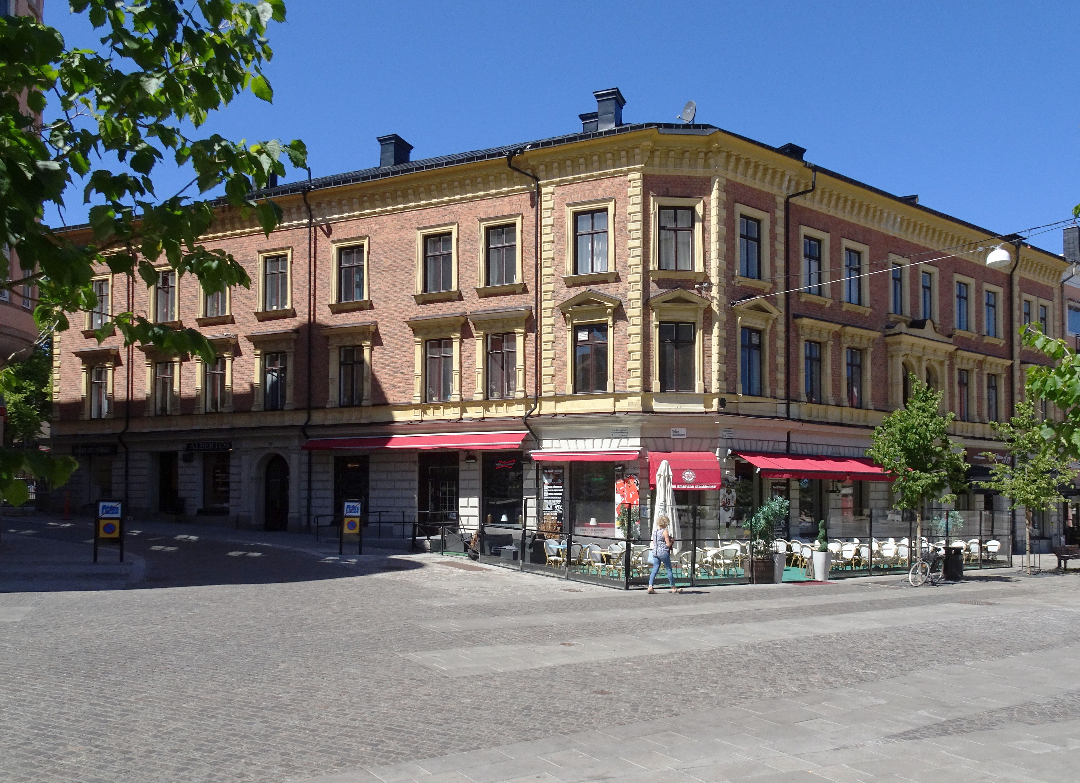 Fastigheten Saturnus 7, Järnagatan 4, Badhusgatan 2, arkitekt troligen byggmästare Carl Lignell, 1888.